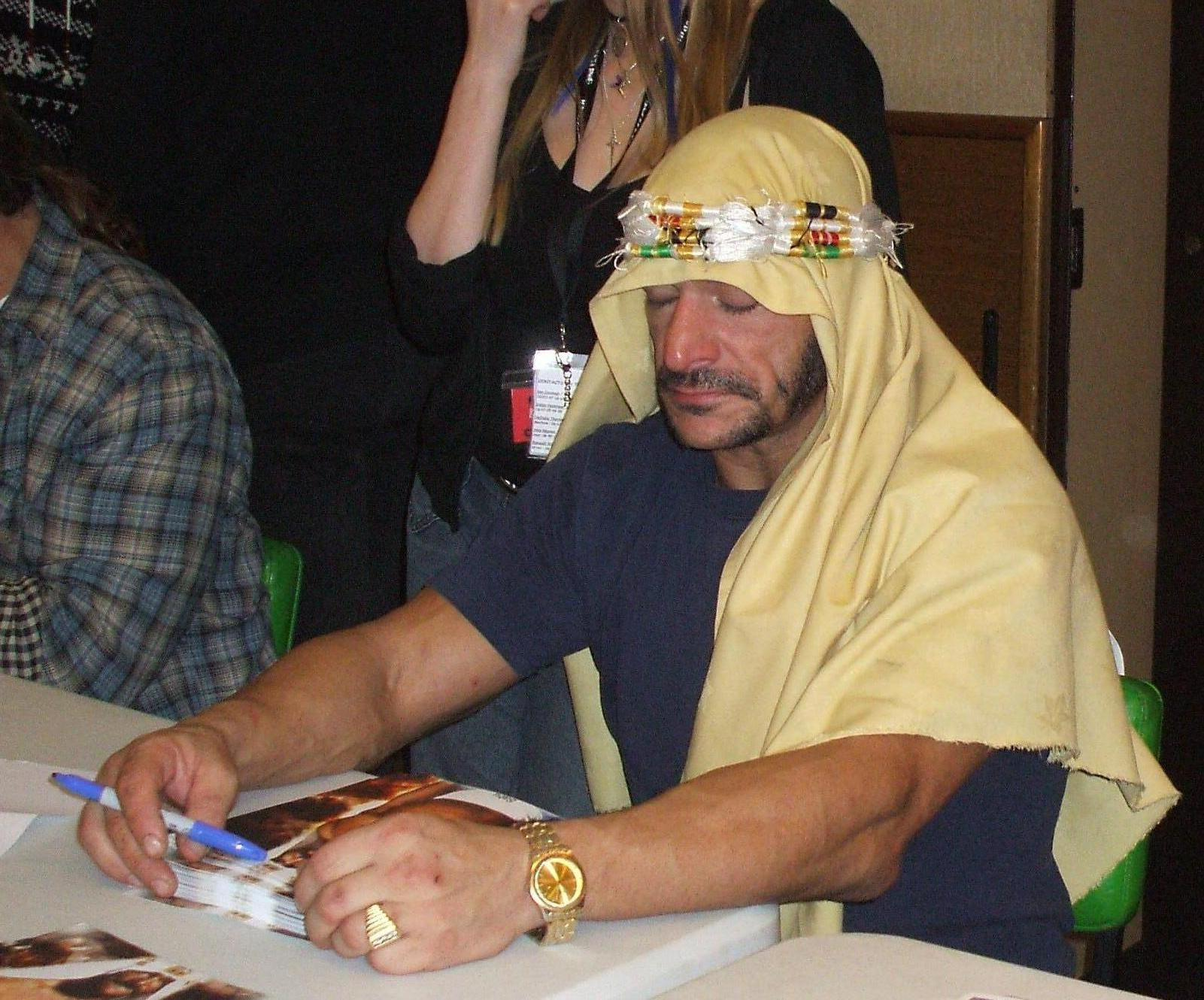 catcheur terry bunk dit sabu après un combat au palais des sports de paris